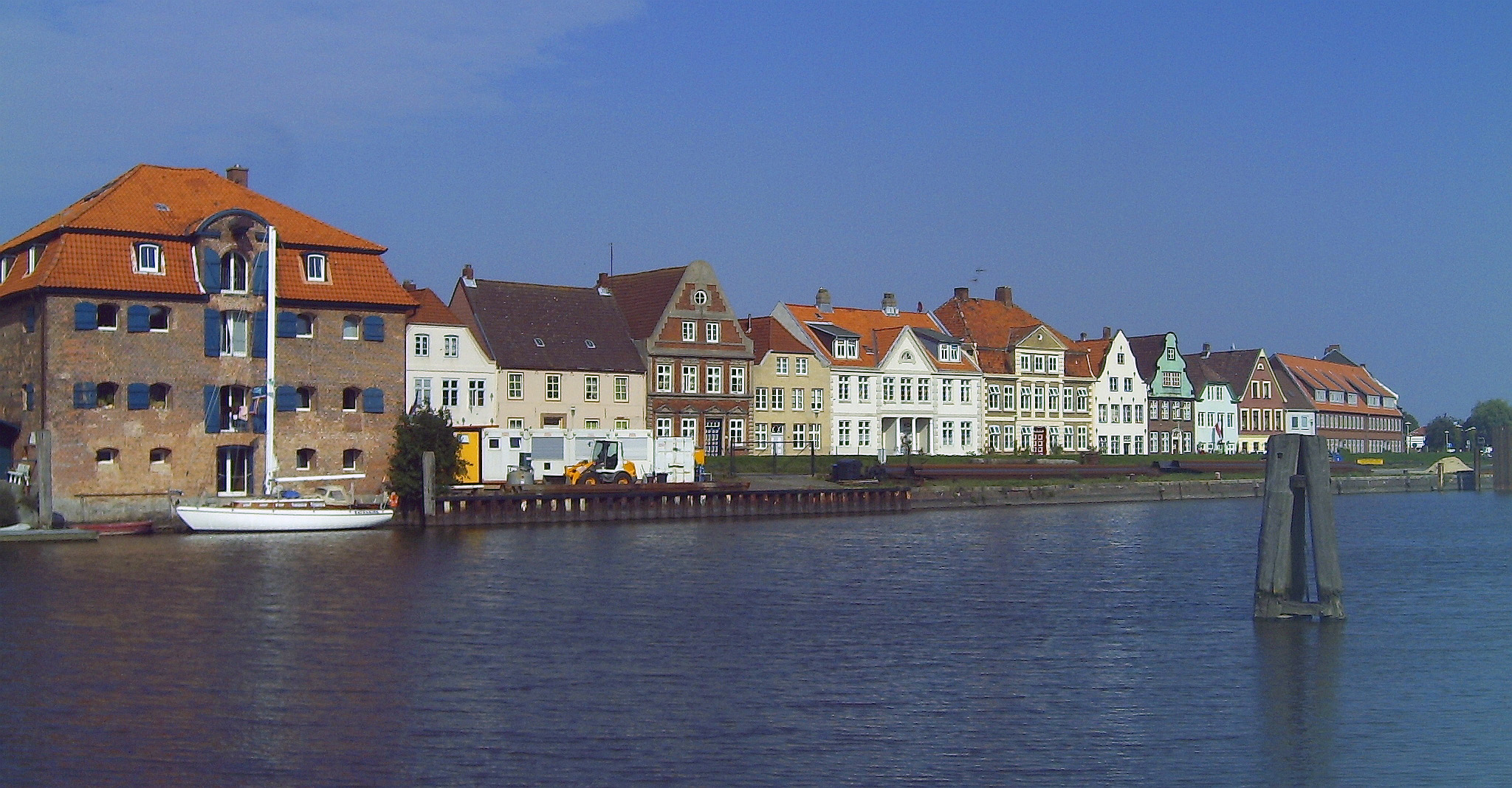 Glückstadt, Germany